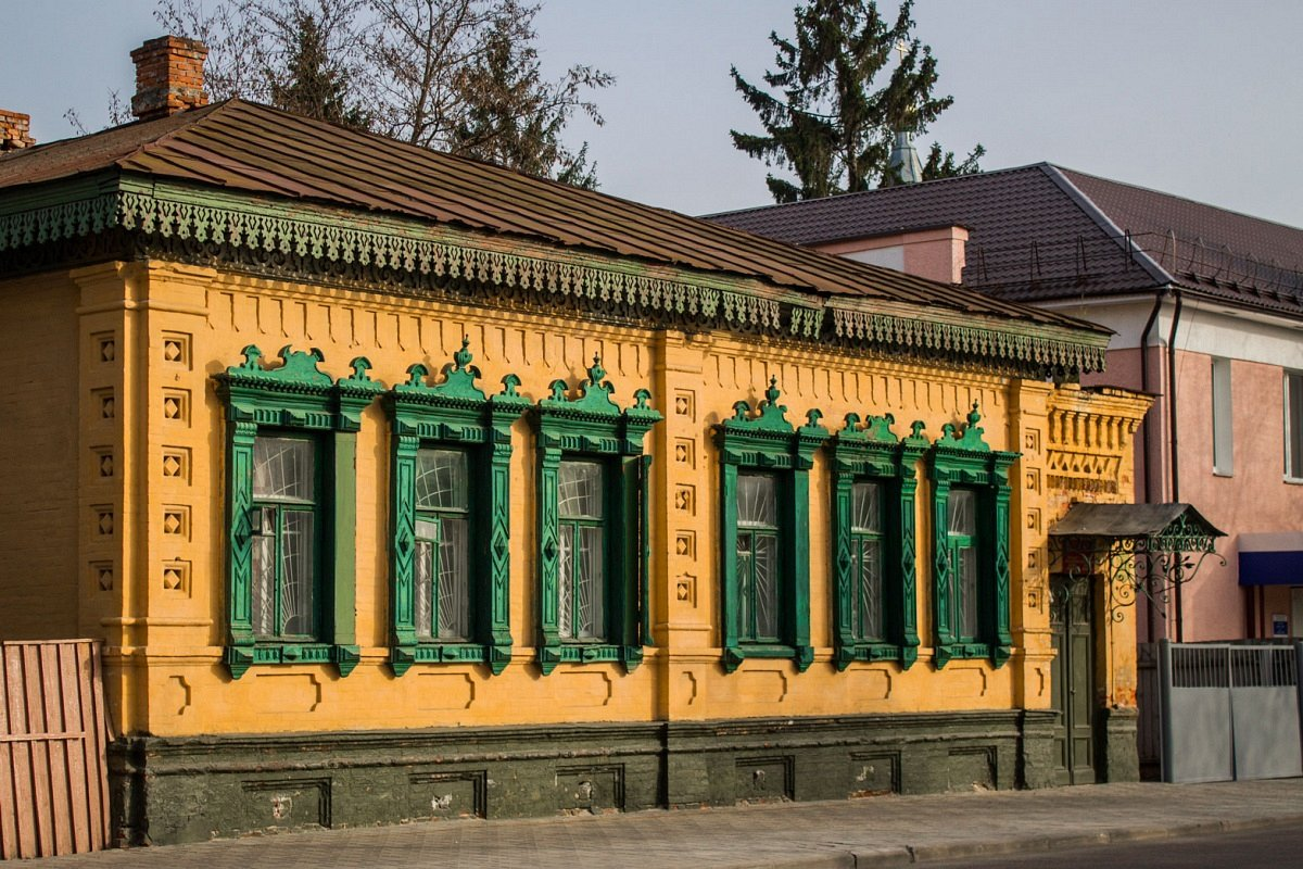 Гарадская забудова Гомеля